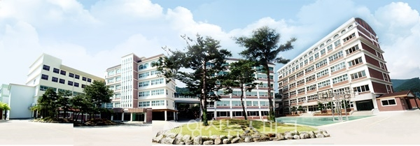 양산제일고등학교의 전경